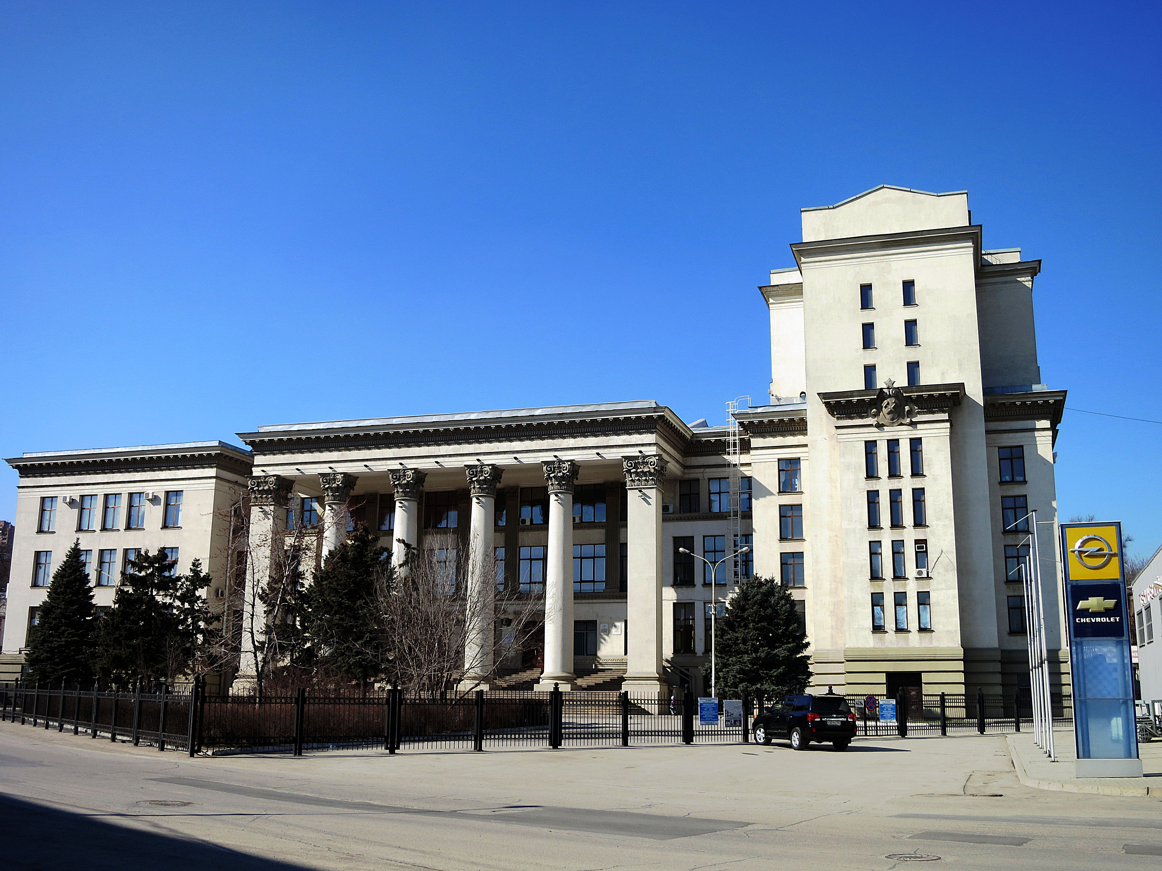 Дворец культуры железнодорожников: улица Гусева, 2А/5, улица Депутатская, литер А, Ростов-на-Дону, Ростовская область